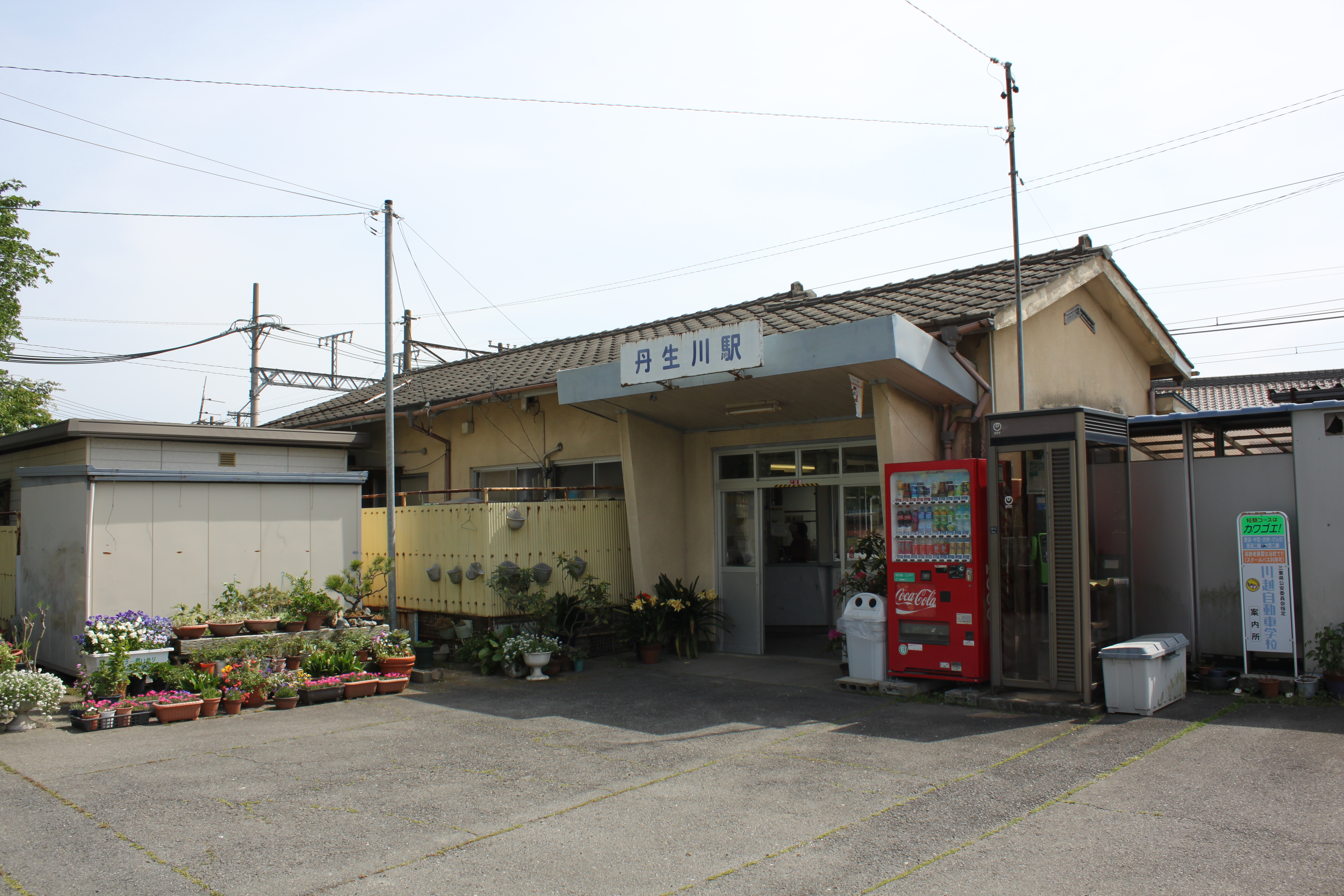 三岐鉄道三岐線丹生川駅駅舎